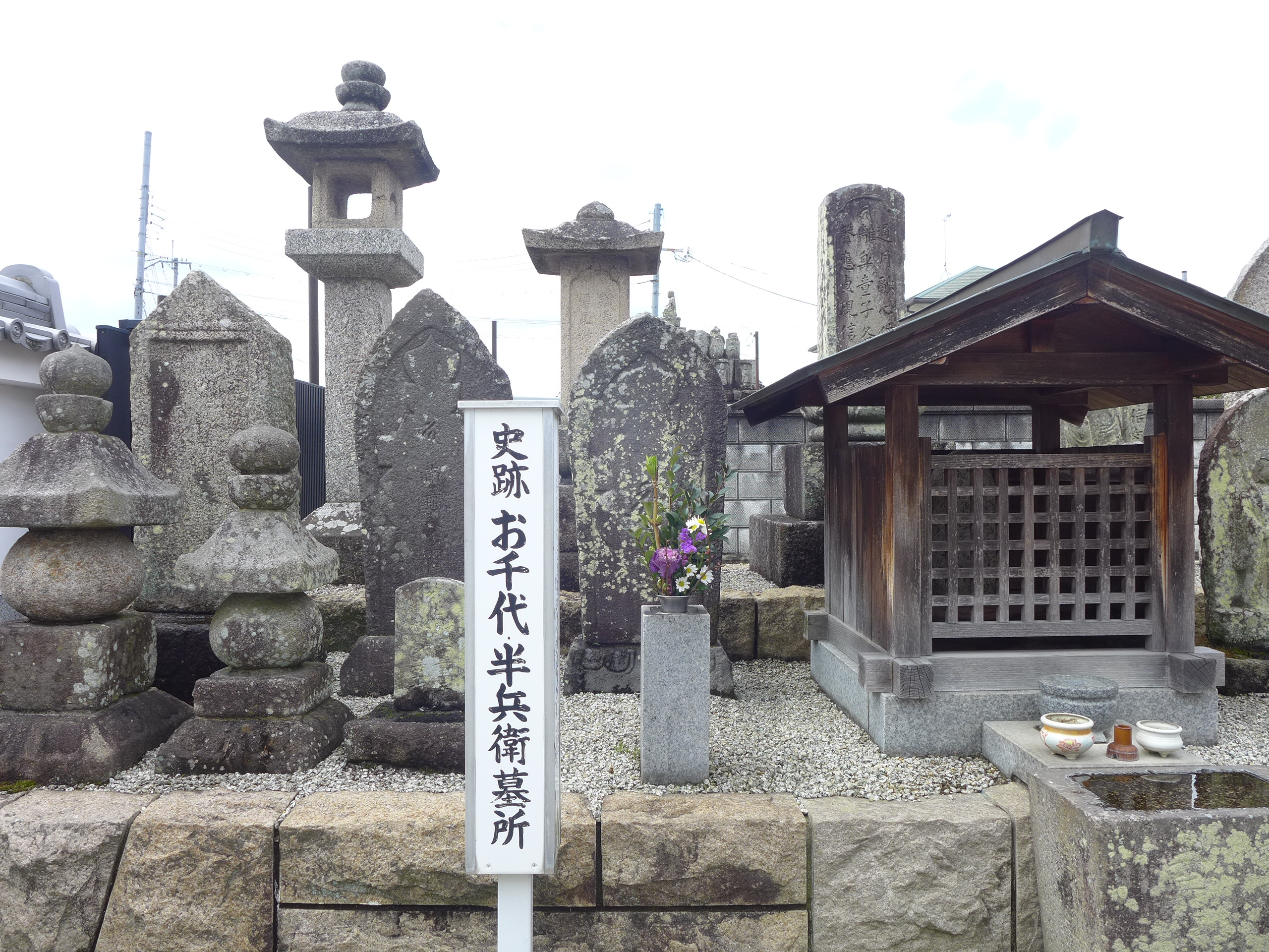 史跡 お千代半兵衛墓所